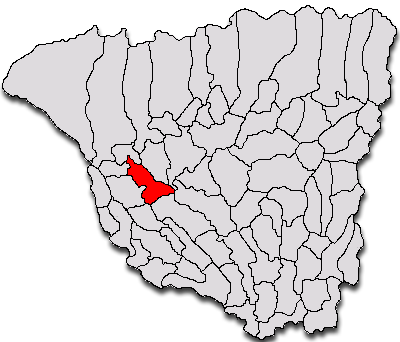 Categorie:Hărţi ale judeţului Gorj